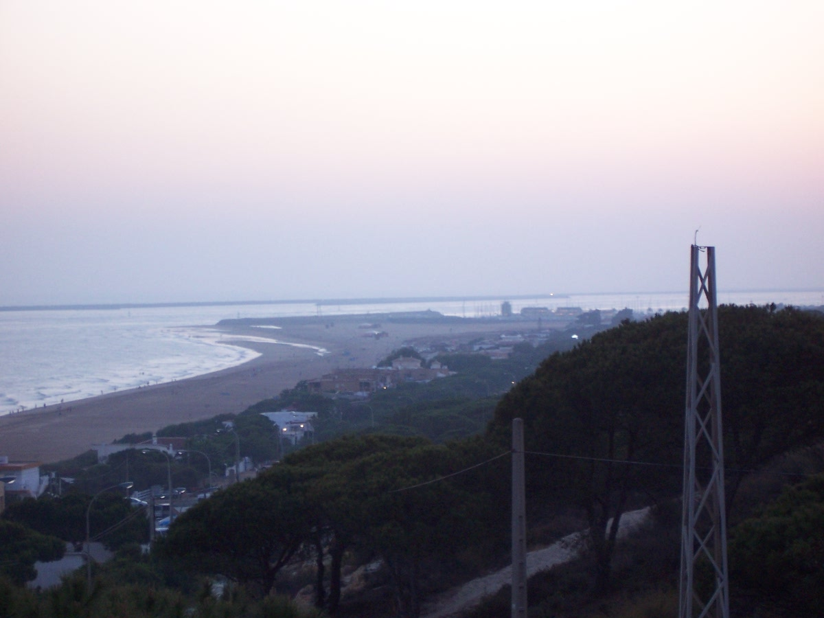 Playa de Mazagón camera: Kodak DX7440 Source: *Daniel Csorfoly